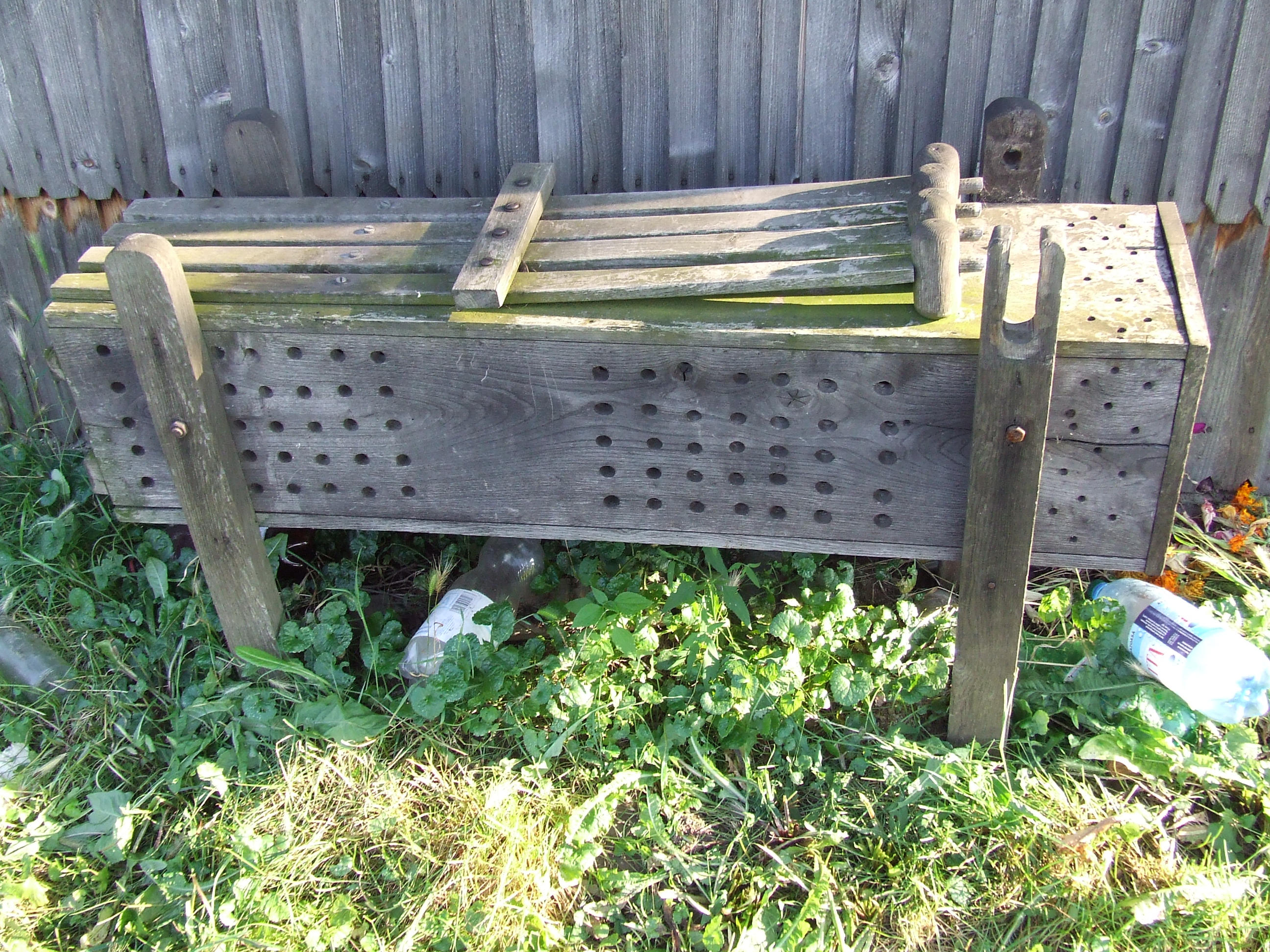 Biserica de lemn din Bolda, judeţul Satu Mare. Toaca bisericii.